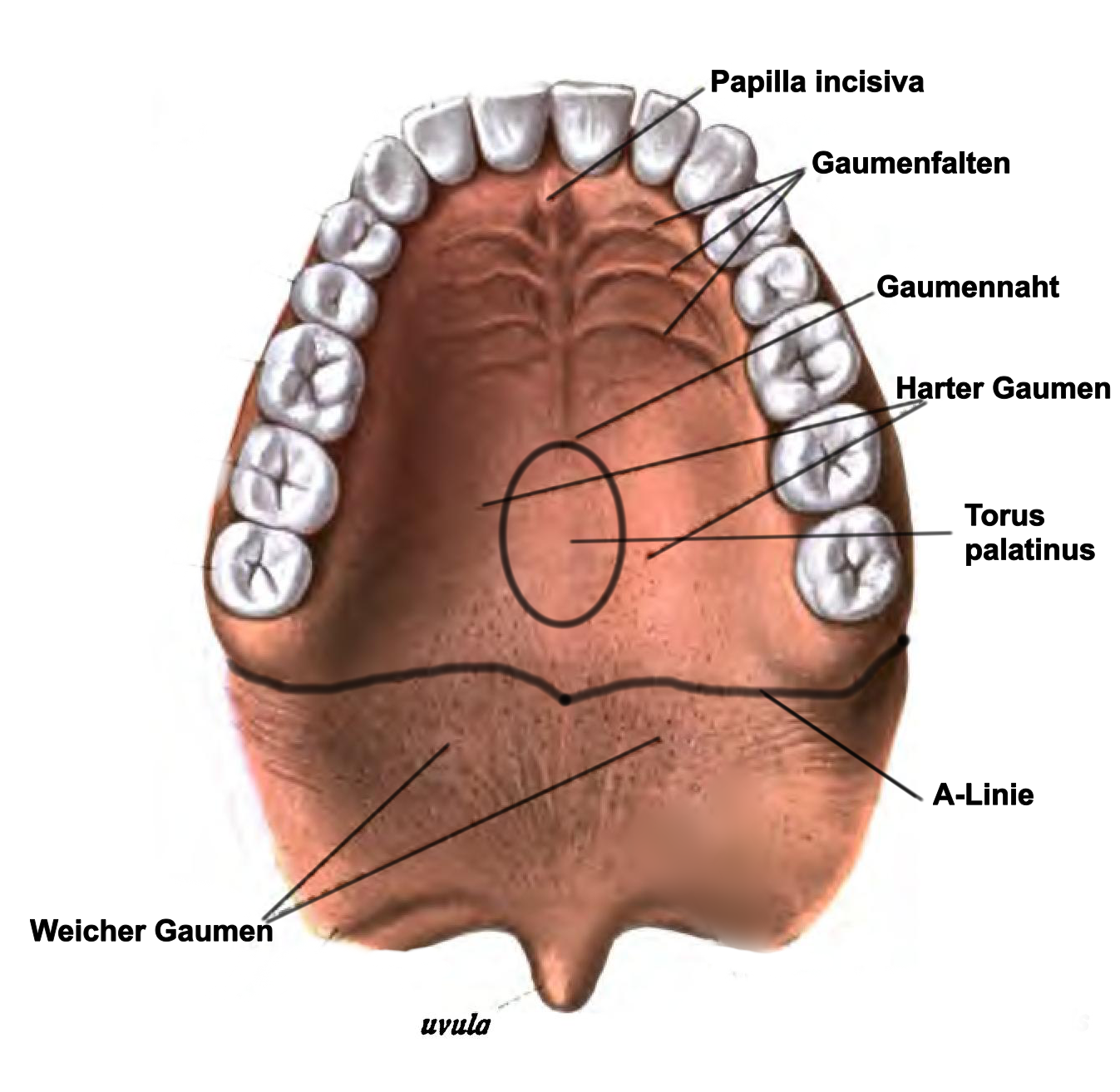 Gaumen